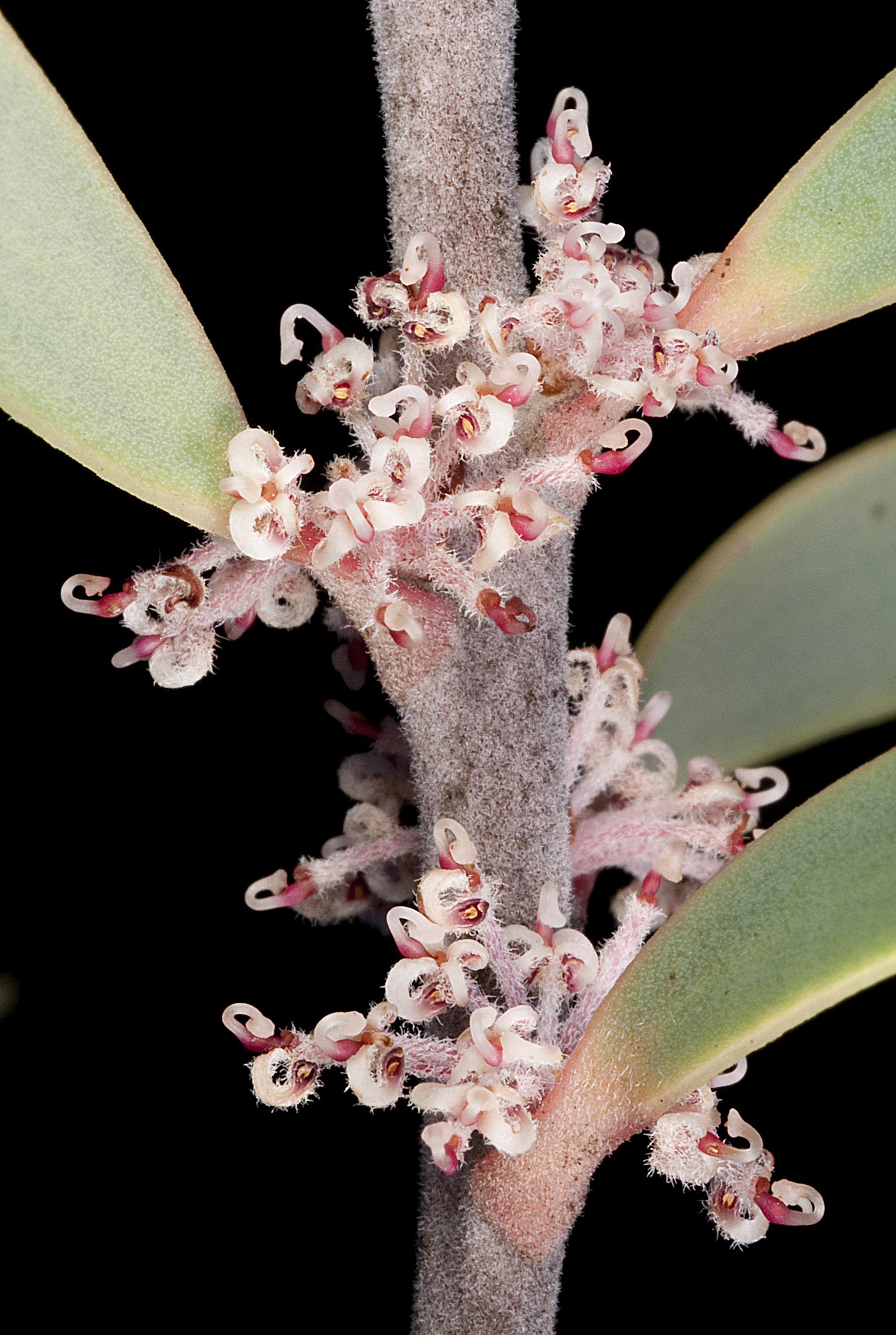 KRT4004